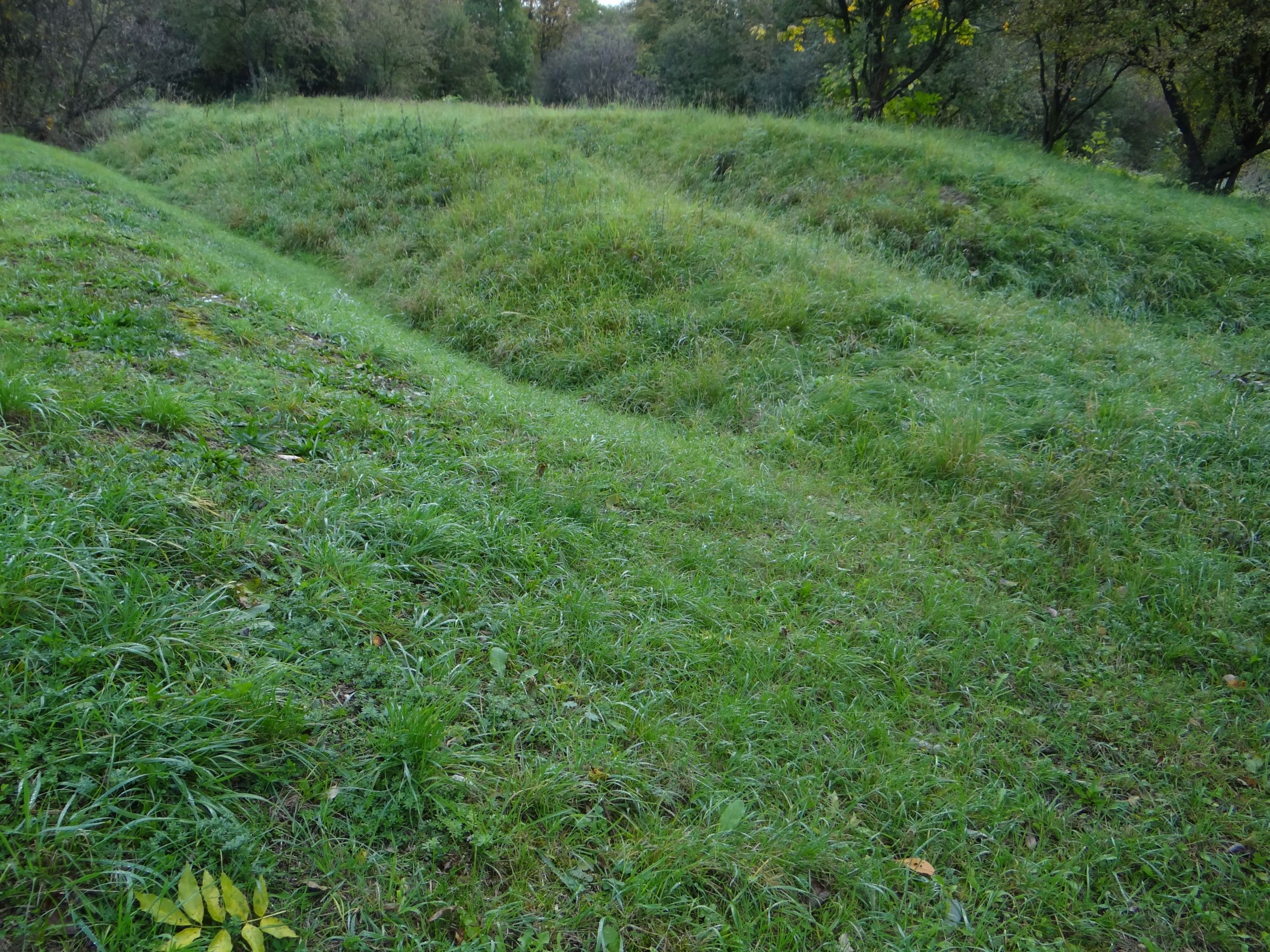 Szaniec FS-21 w dawnej Twierdzy Kraków